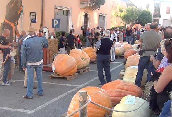 Presentazione delle zucche portate in gara a Petricci nel 2013 in attesa della pesatura per decretare il vincitore.